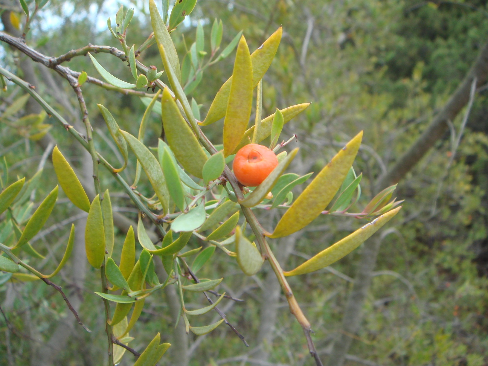 Osyris lanceolata, Chiclana, (Cádiz), España